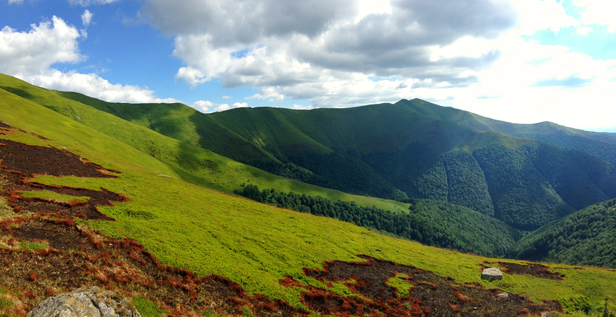 «Потік Оса», Воловецький р-н, ДП «Воловецьке ЛГ», Нижньоволовецьке л-во, квартал 8, 9, 12, 13, 15, 16, 21